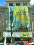 Fachada del teatro Nuevo Apolo en el estreno de Sancho Panza el musical